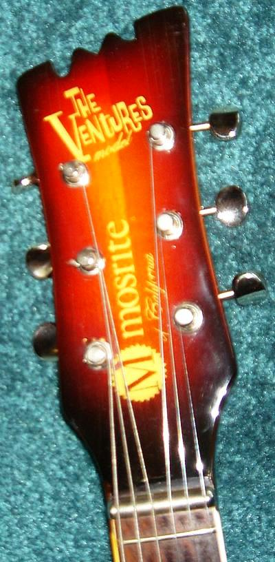 Bob Bogle, 1934 -- 2009